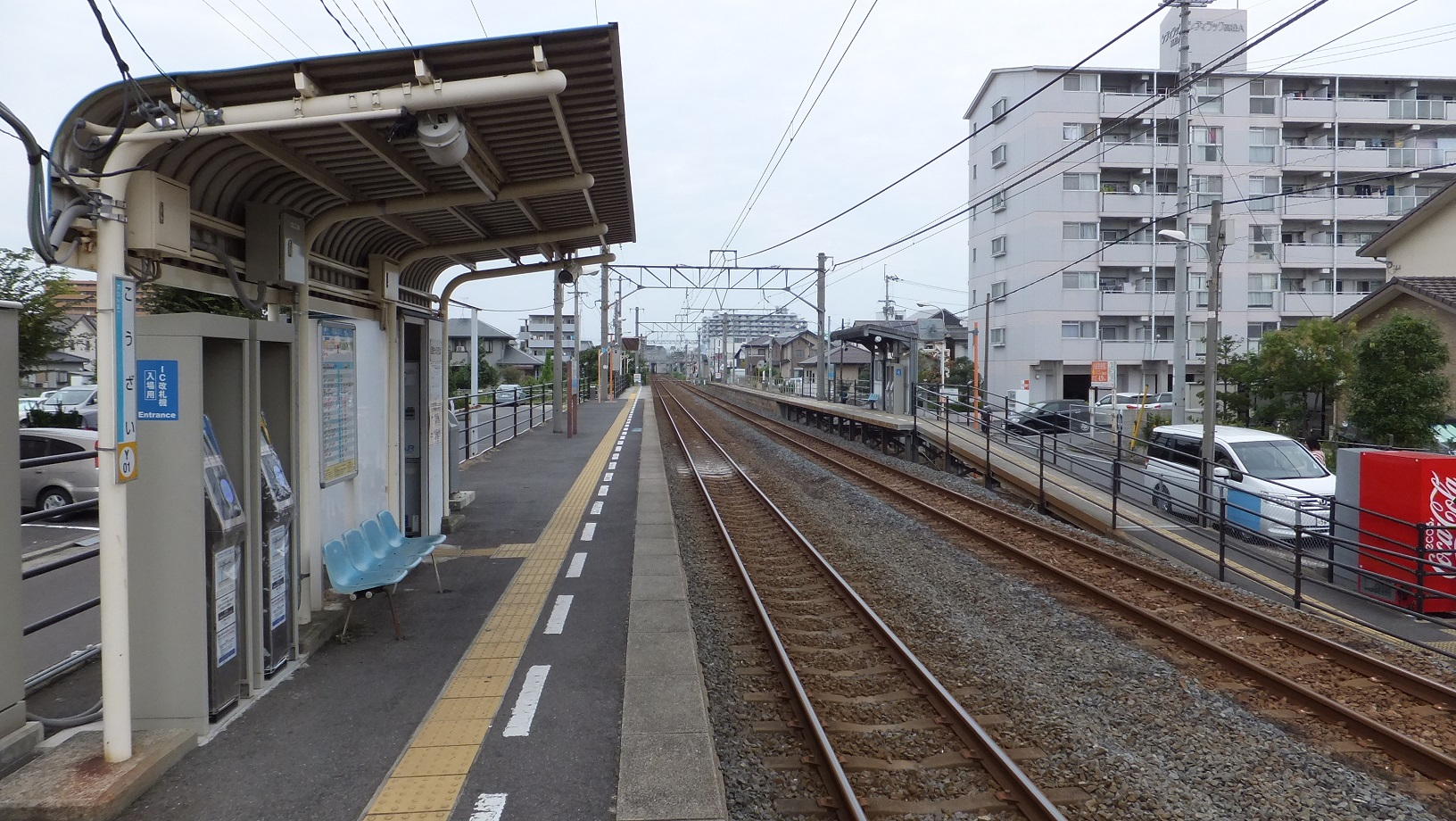 JR予讃線 香西駅 （香川県高松市）上りホーム坂出方より撮影